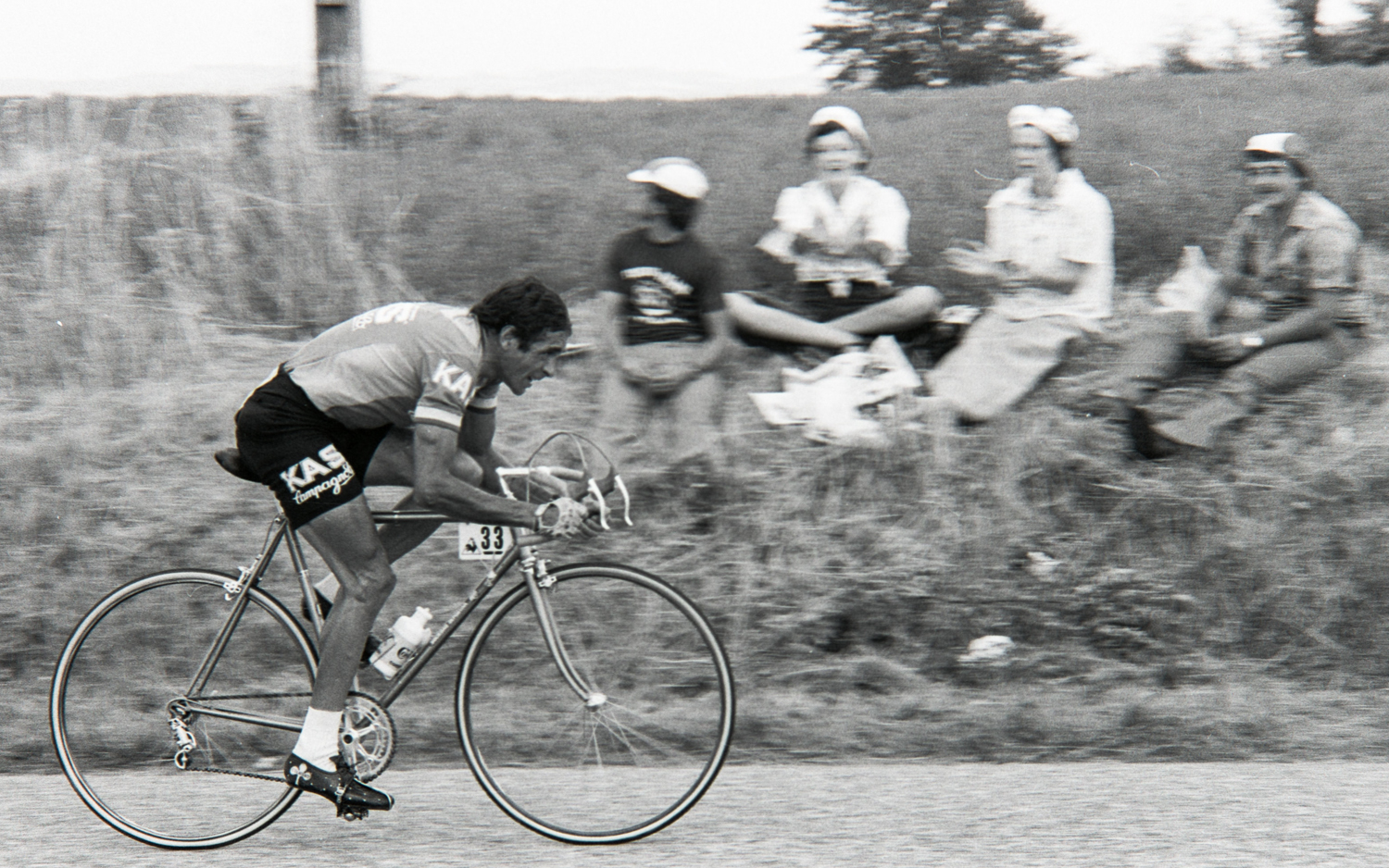 Vicente Lopez-Carril durant le Tour de France 1976. Photographie : René Milanese